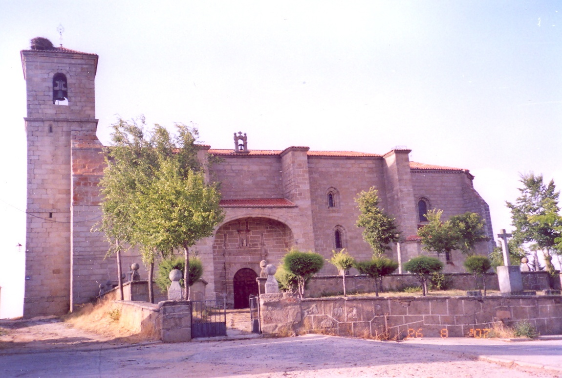 IGLESIA DE VILLANUEVA DEL CAMPILLO (AVILA, ESPAÑA)